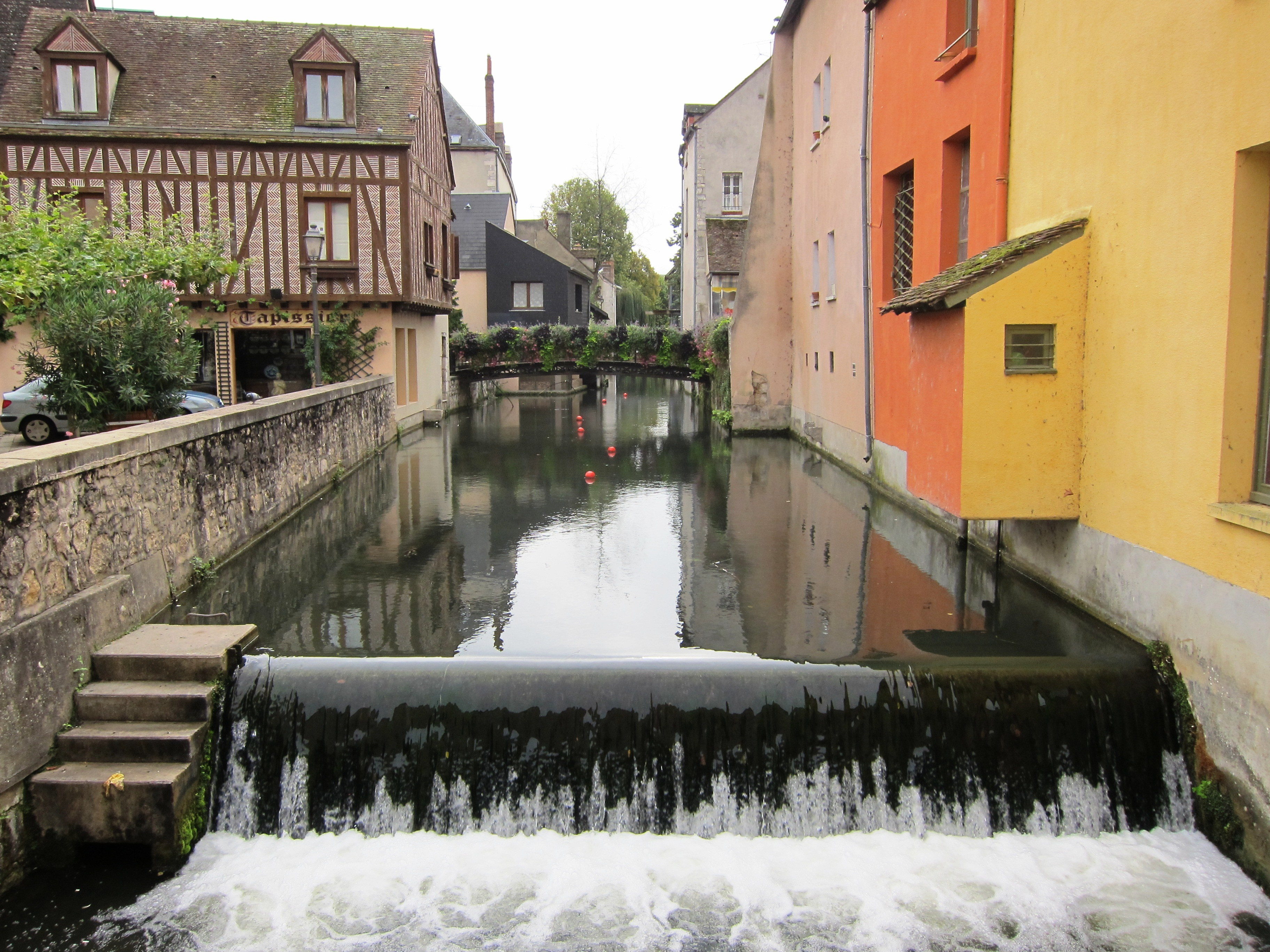 Montargis